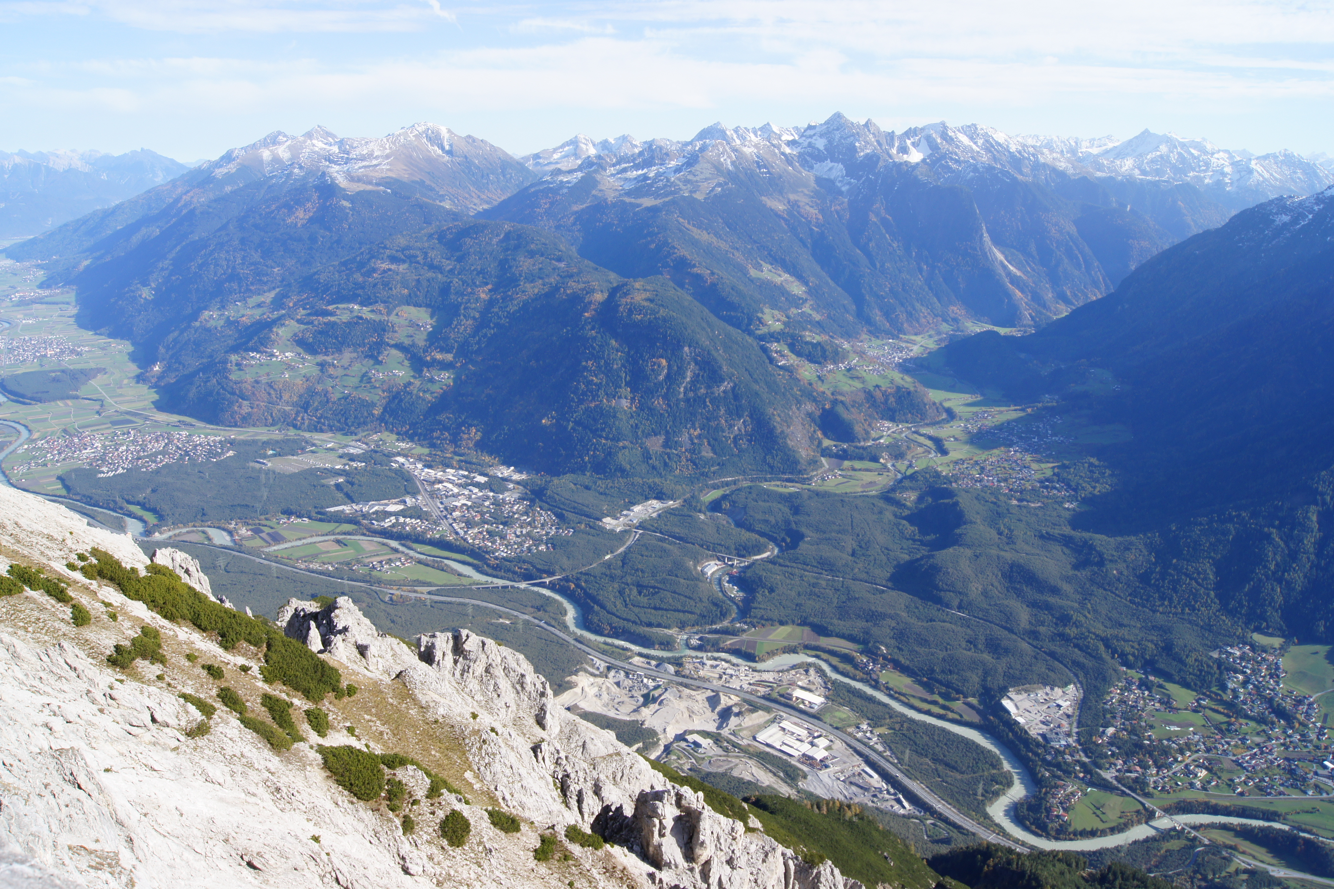 Blick auf Tiroler Forchet (Föhrenwald) von Tschirgantgipfel aus, rechts das, unter Schutz stehende Sautener Forchet ("NSG Tschirgant Bergsturz"), links das gleichwertige Haiminger Forchet welches laufend von Bau- und Rodungsprojekten bedroht wird This media shows the nature reserve in the Tyrol with the ID 7119.